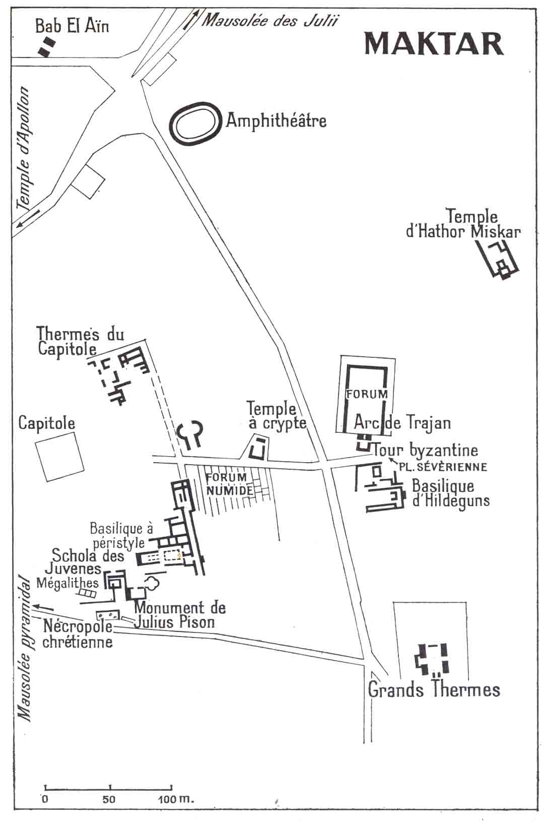 Plan des ruines de Maktar